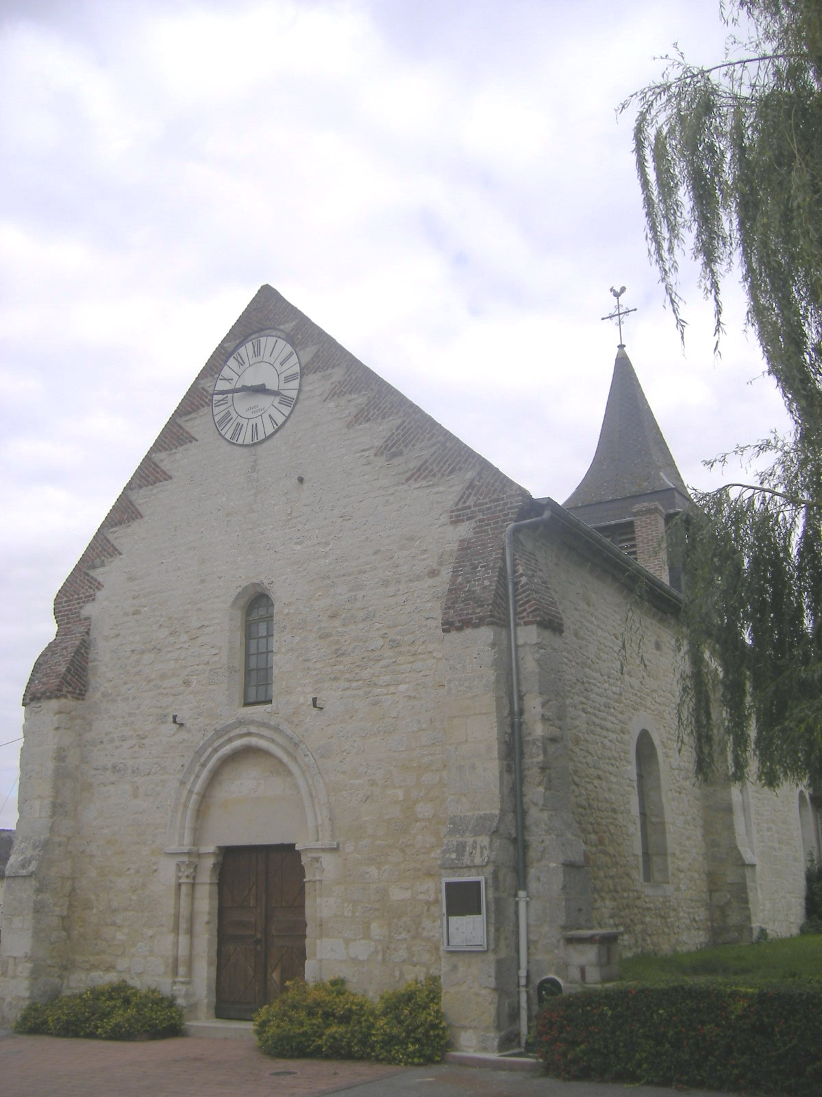 Église Saint-Pierre de Chivres-en-Laonnois